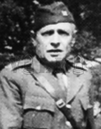 Div. gen. Jaroslav Čihák, československý voják a příslušník Obrany národa